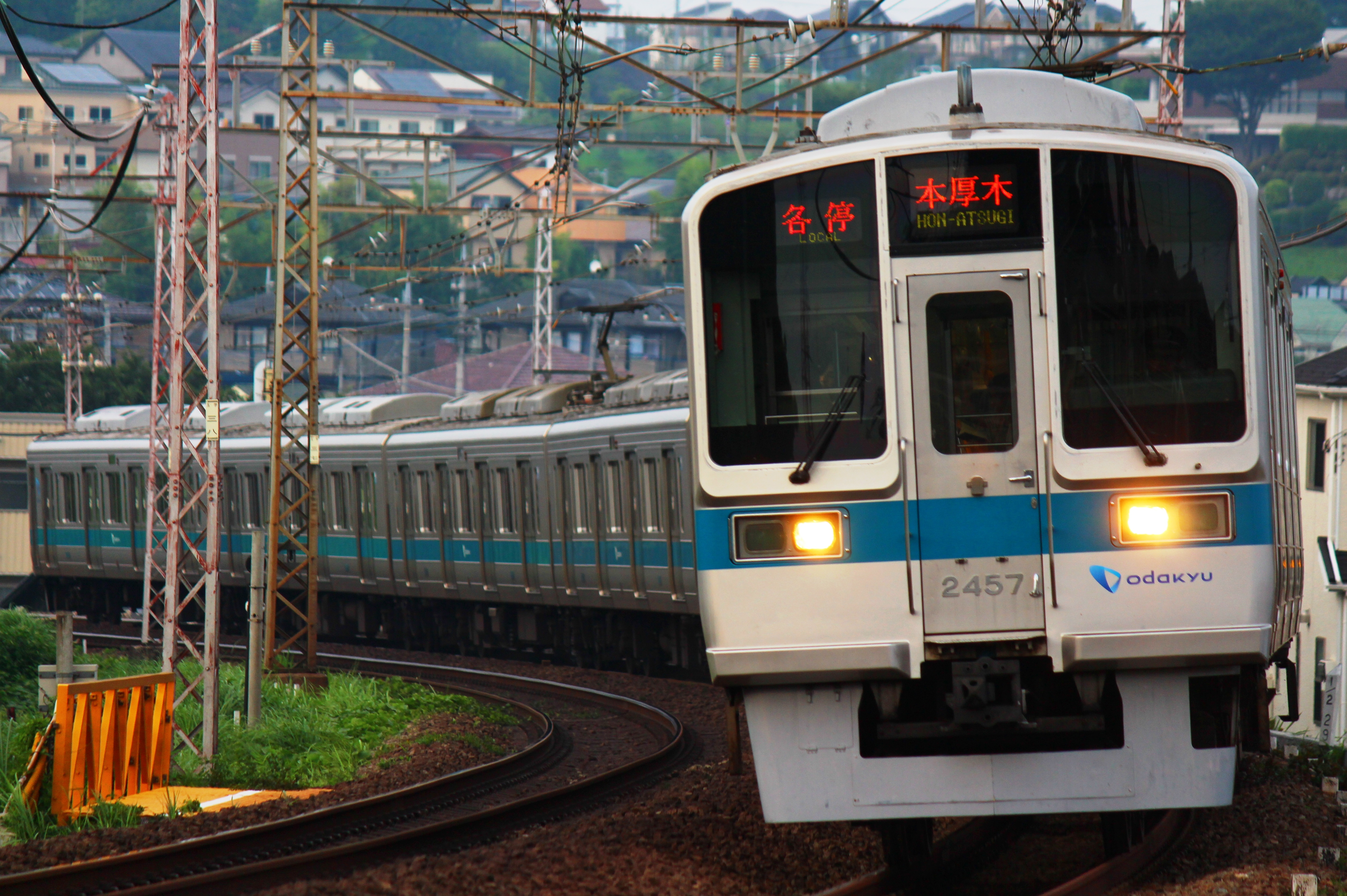 小田急電鉄 通勤型車両 2000形 各停本厚木行き